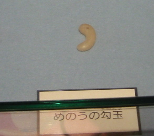 めのうの勾玉神戸市埋蔵文化財センターにて